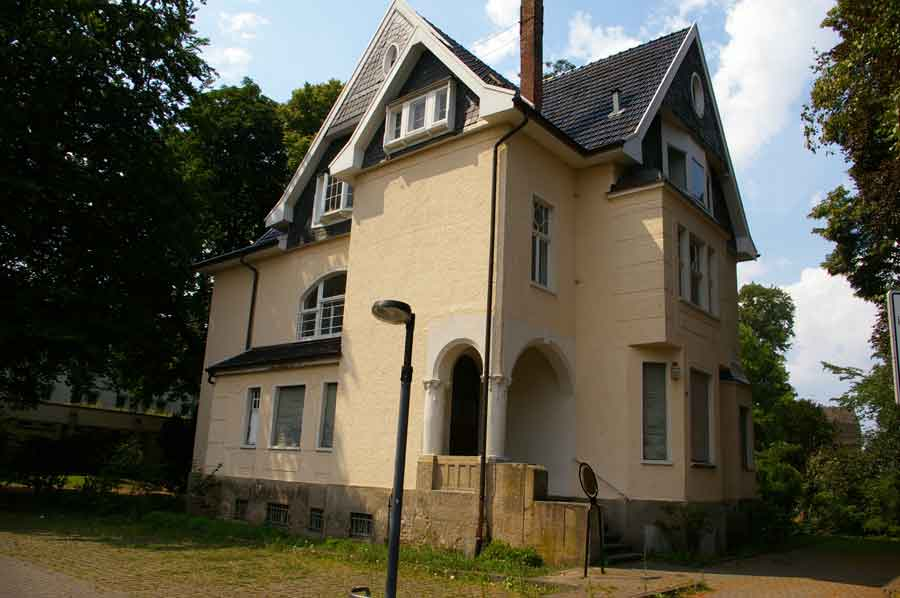 Villa Berger in Langenfeld (Rhld.)